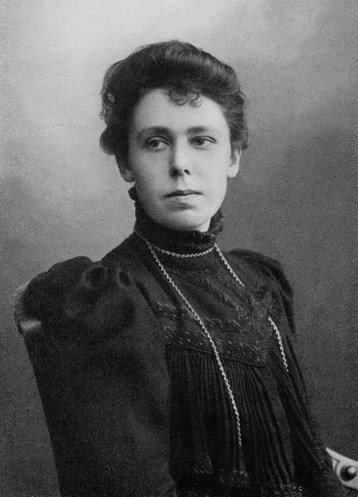 Prof. Dr. Margarete von Wrangell, Fürstin Andronikow